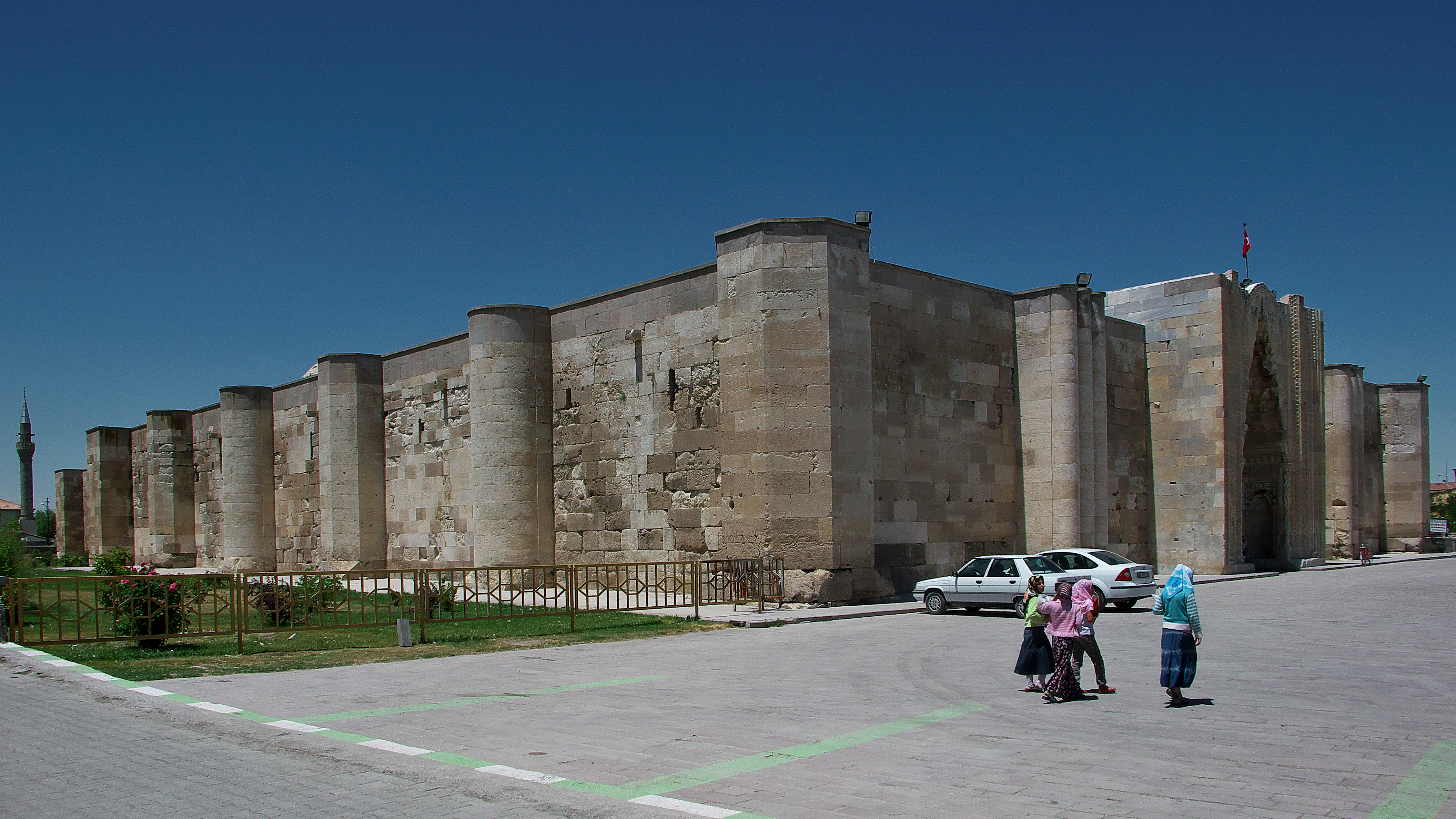 Construido por el sultán Alaattin Keykubat I (Alâeddin Keykûbad) en 1229.